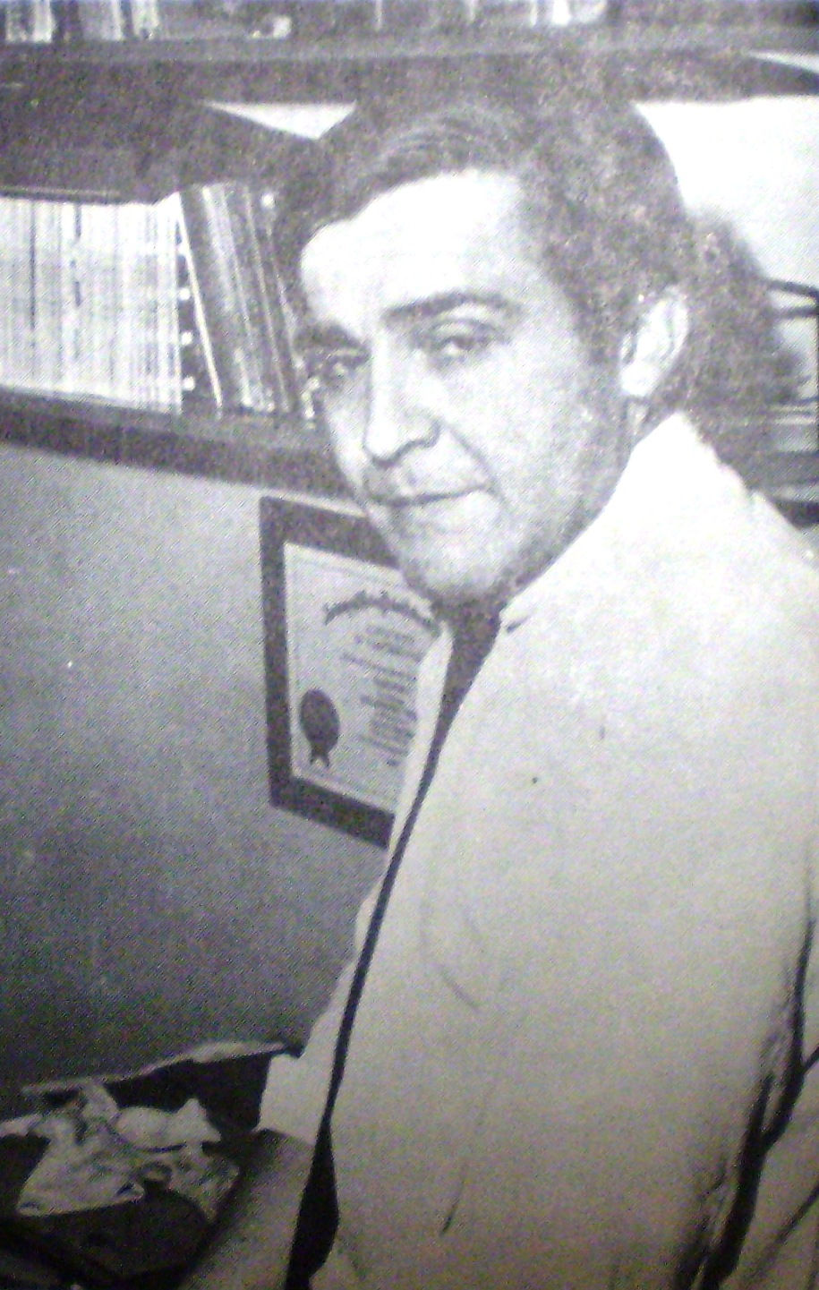 Francisco (Paco) Urondo. Fotografía Forte